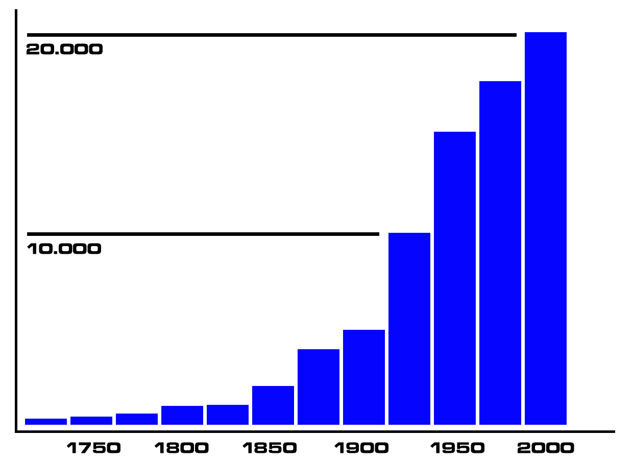 Bevolkingsgrafiek van Tegelen. Let op de grote bevolkingstoename begin 19e eeuw (pottenbakkerijen) en na 1900 (keramische en metaalindustrie). Bevolkingsgrafiek Tegelen 13 juli 2007.